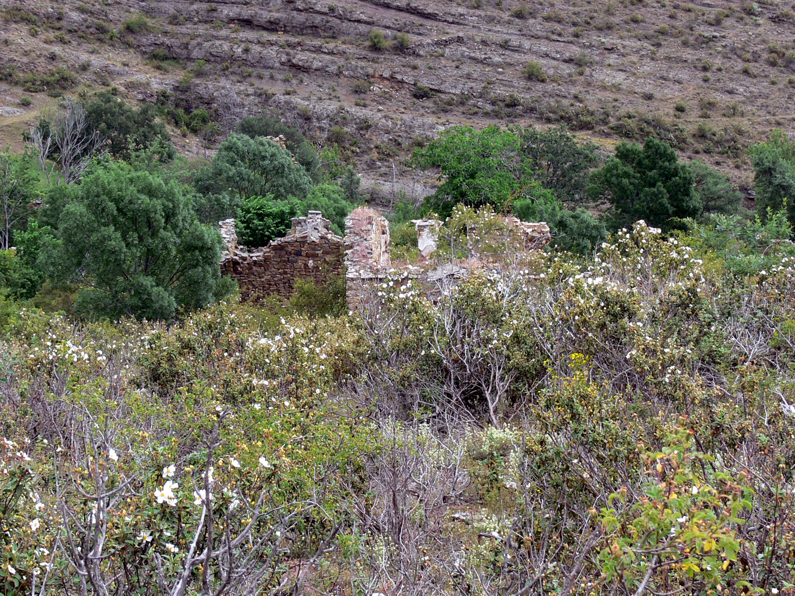 Buzarra, aldea despoblada de Robres del Castillo (La Rioja, España).